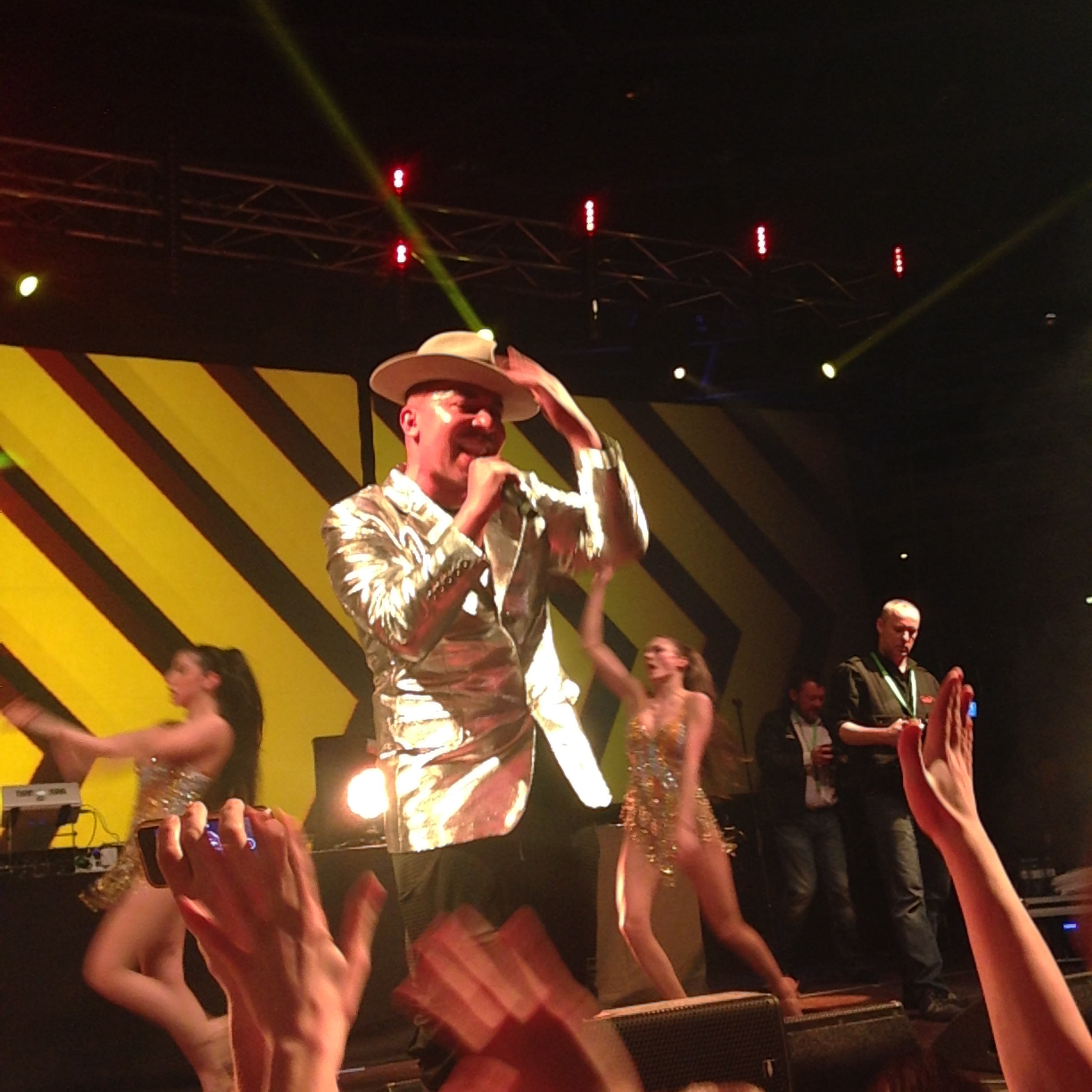 Lou Bega am 8.02.2014 auf der "Die 90er MEGA SAUSE" Party im Velodrom Berlin